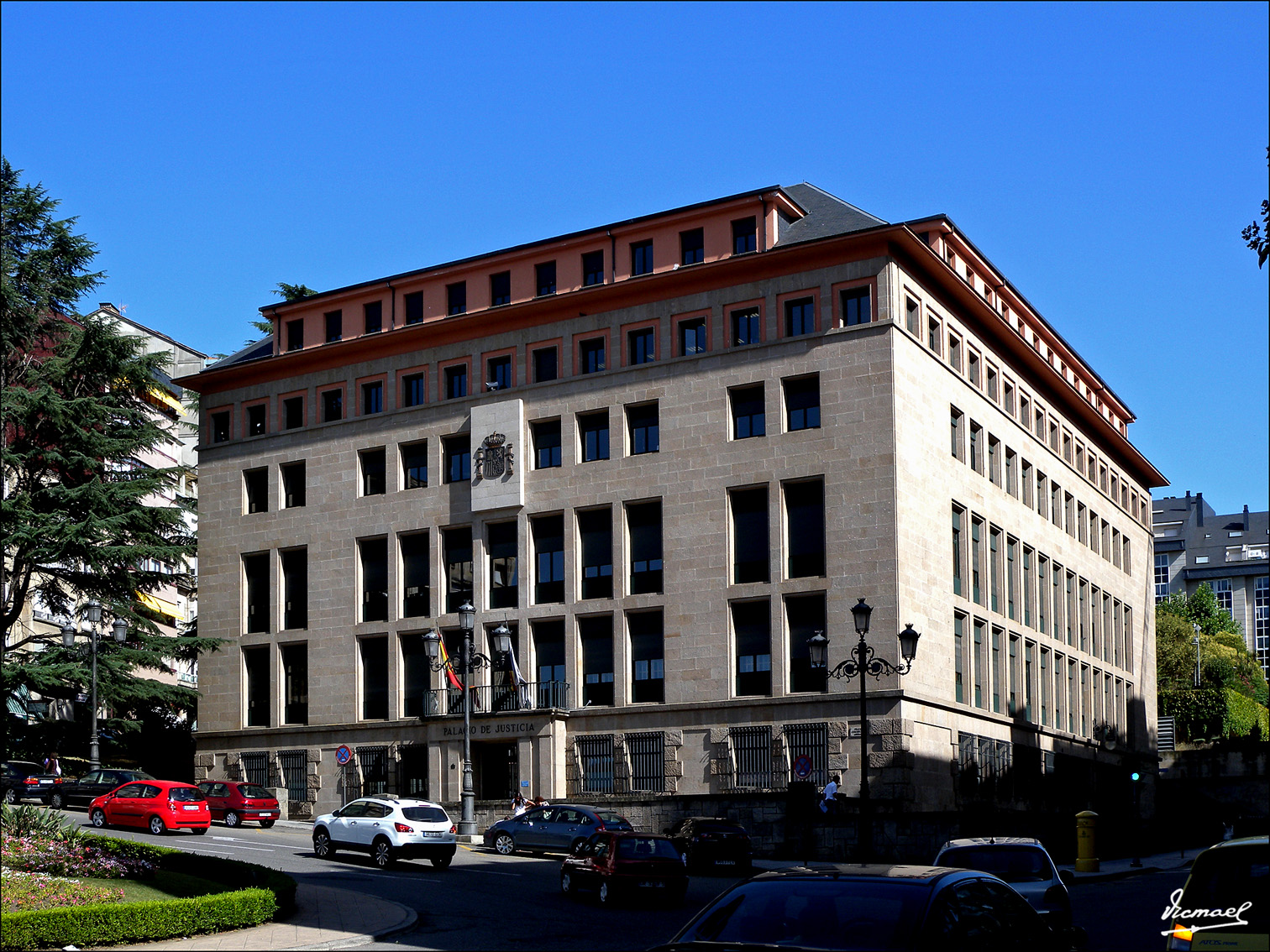 Edificio da Audiencia Provincial de Ourense.